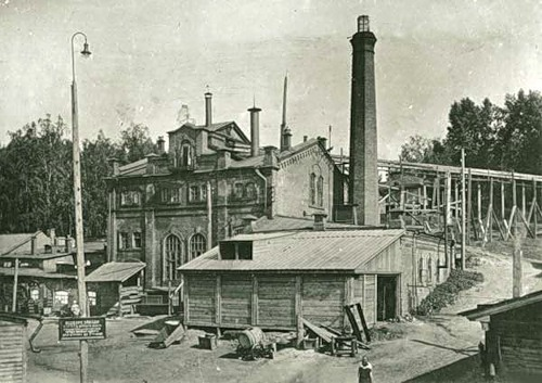 Барнаул. Начало 20 в.